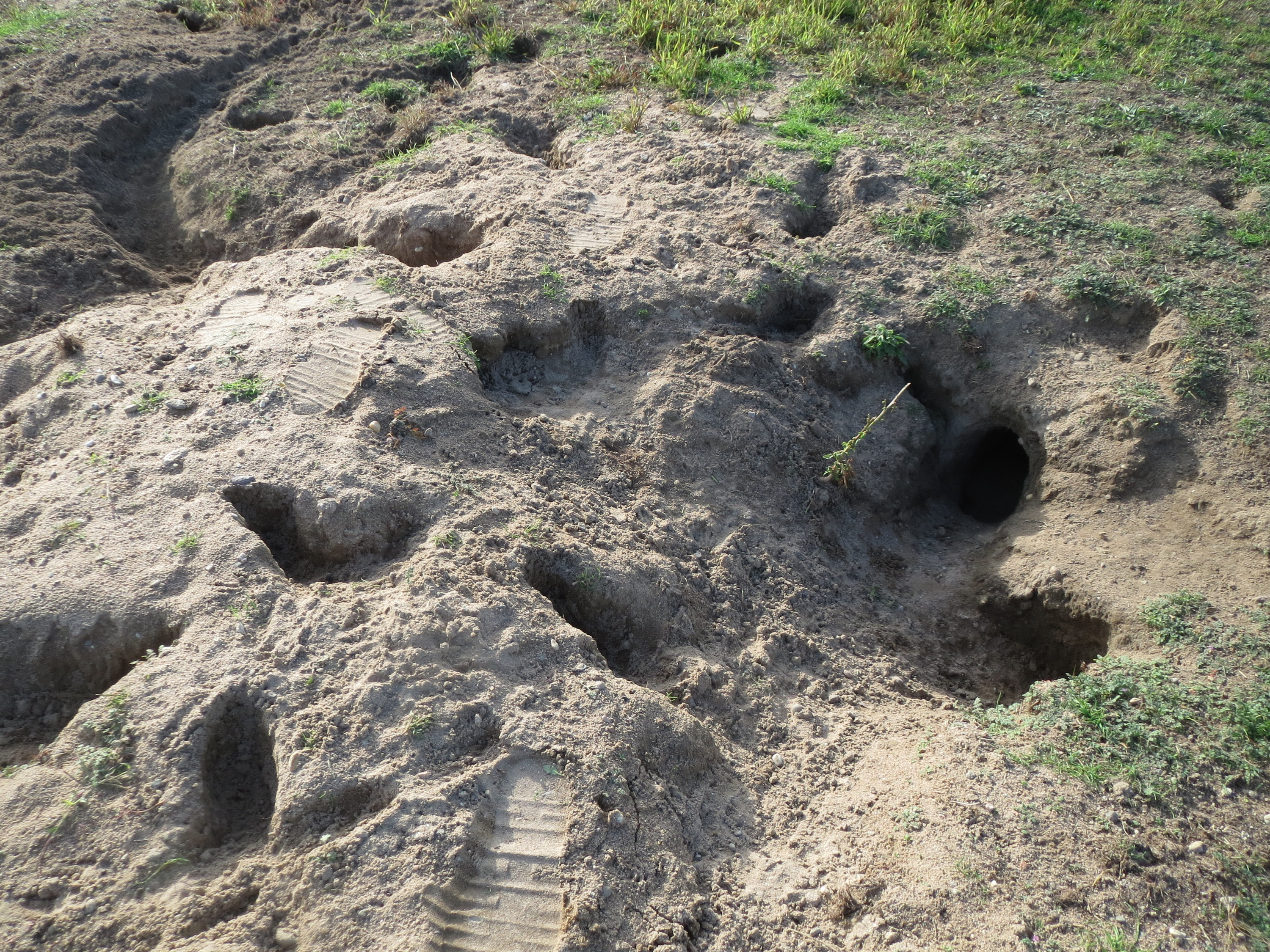 Kaninchenbau in Hockenheim-Talhaus